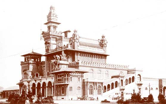 Palácio das Indústrias, São Paulo